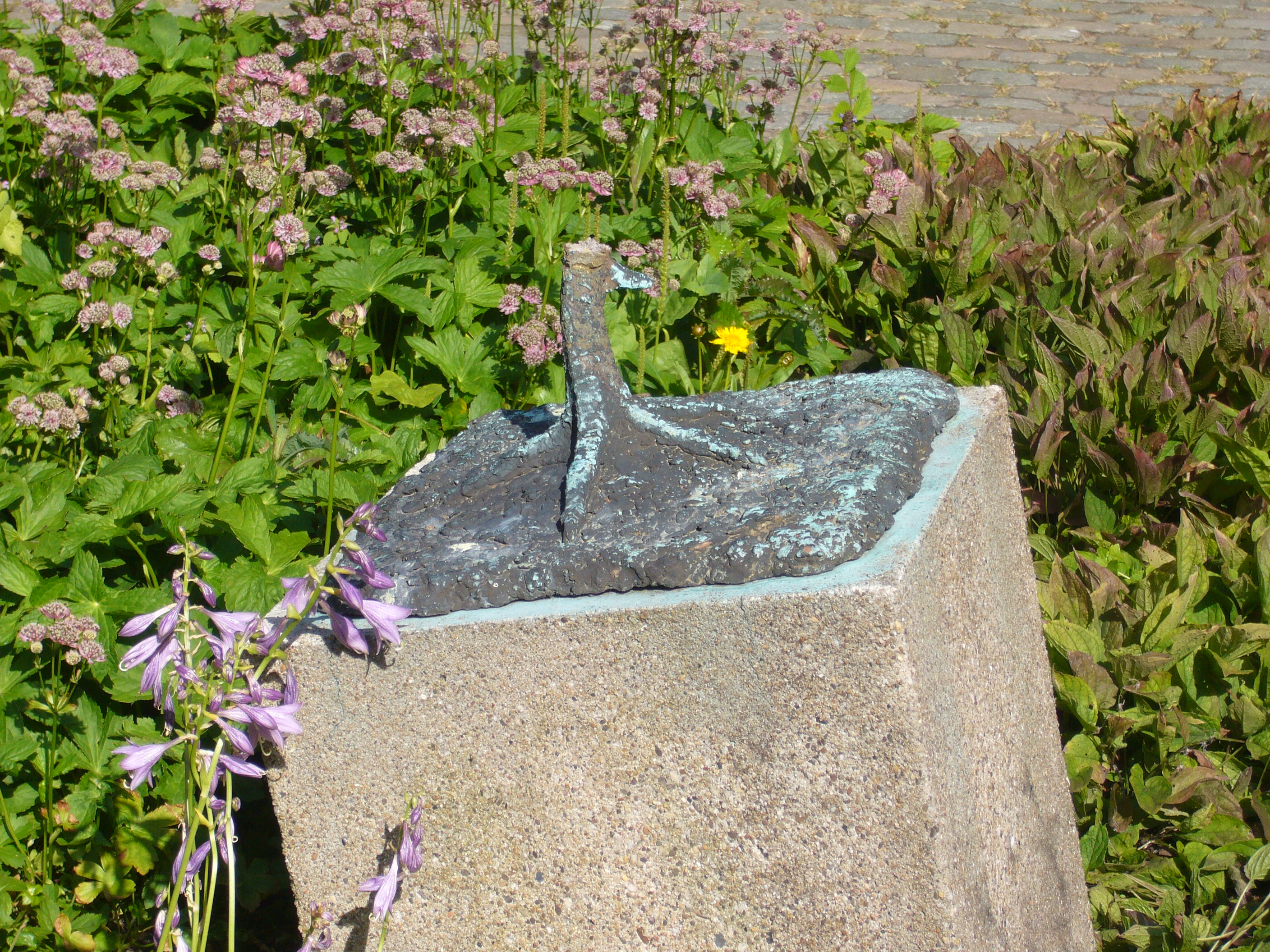 Jos van Riemsdijk (beeldhouwster): krabbende haan (restant, beeld is gestolen)